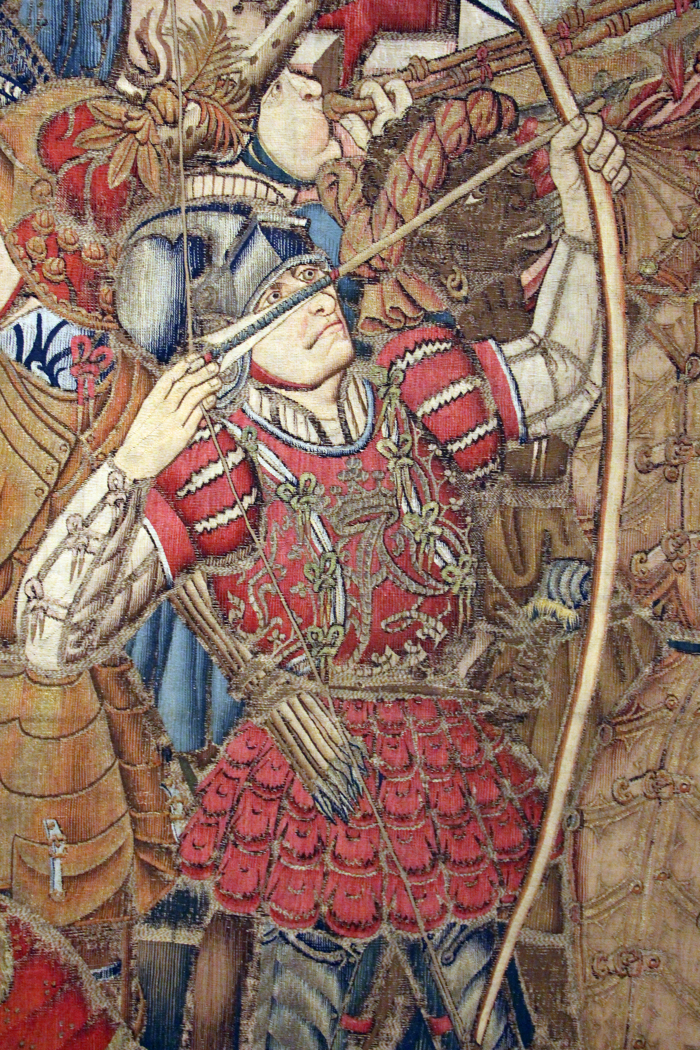 Tournai, arazzo con maturità di alessandro magno, 1460 ca, probab. fatti fare da pasquier grenet per filippo il buono, 11.JPG